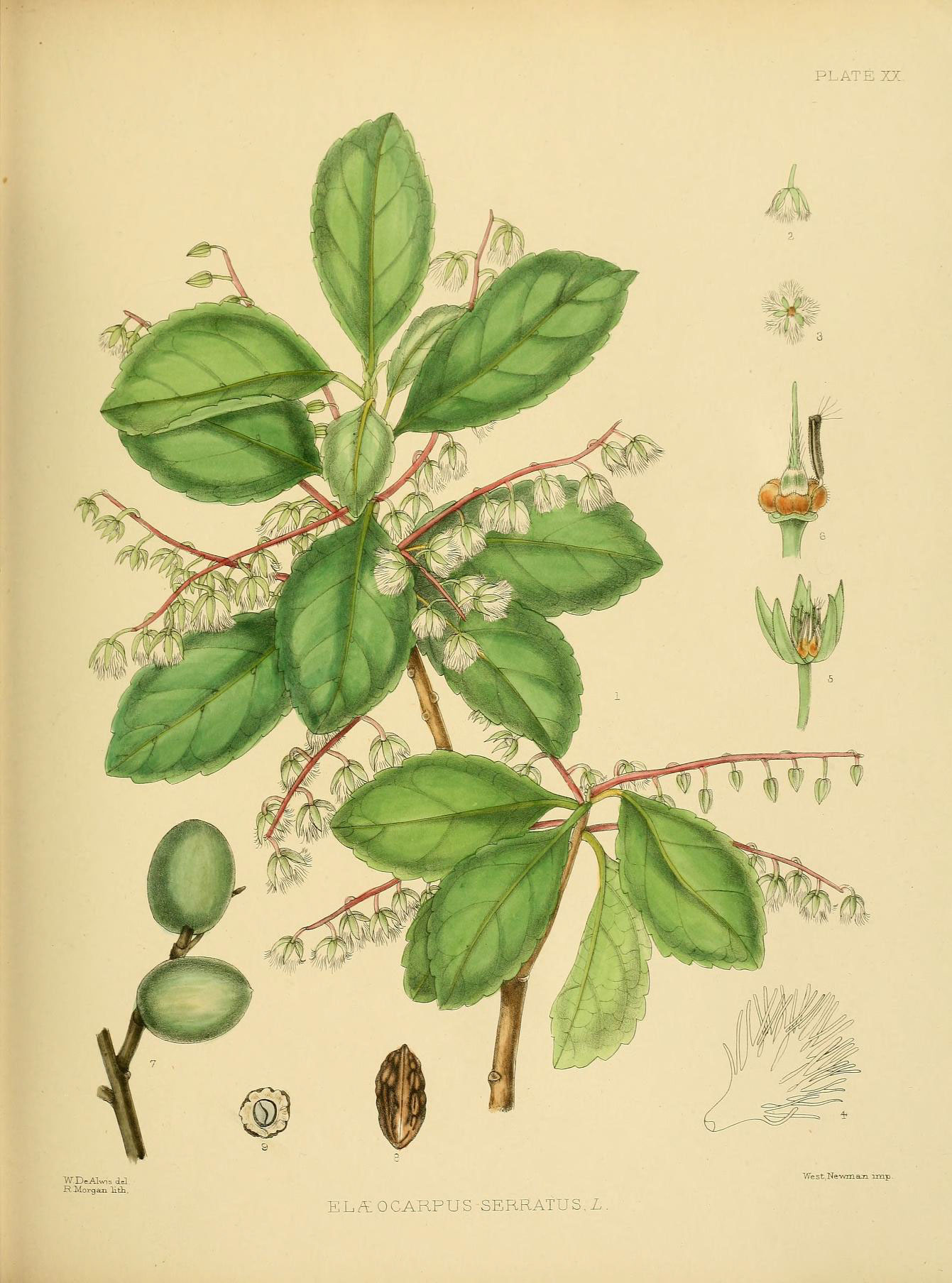 P. ,- " . R Morgan litkt. "We st, Newman imp. EL/tOCARPUS SERRATUS.Z